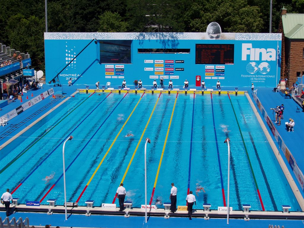 11e Championats du monde de FINA, Montréal, juillet 2005